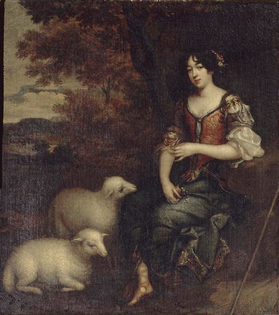 Porträt Mme Deshoulières' (1634-1694) oder Selbstporträt